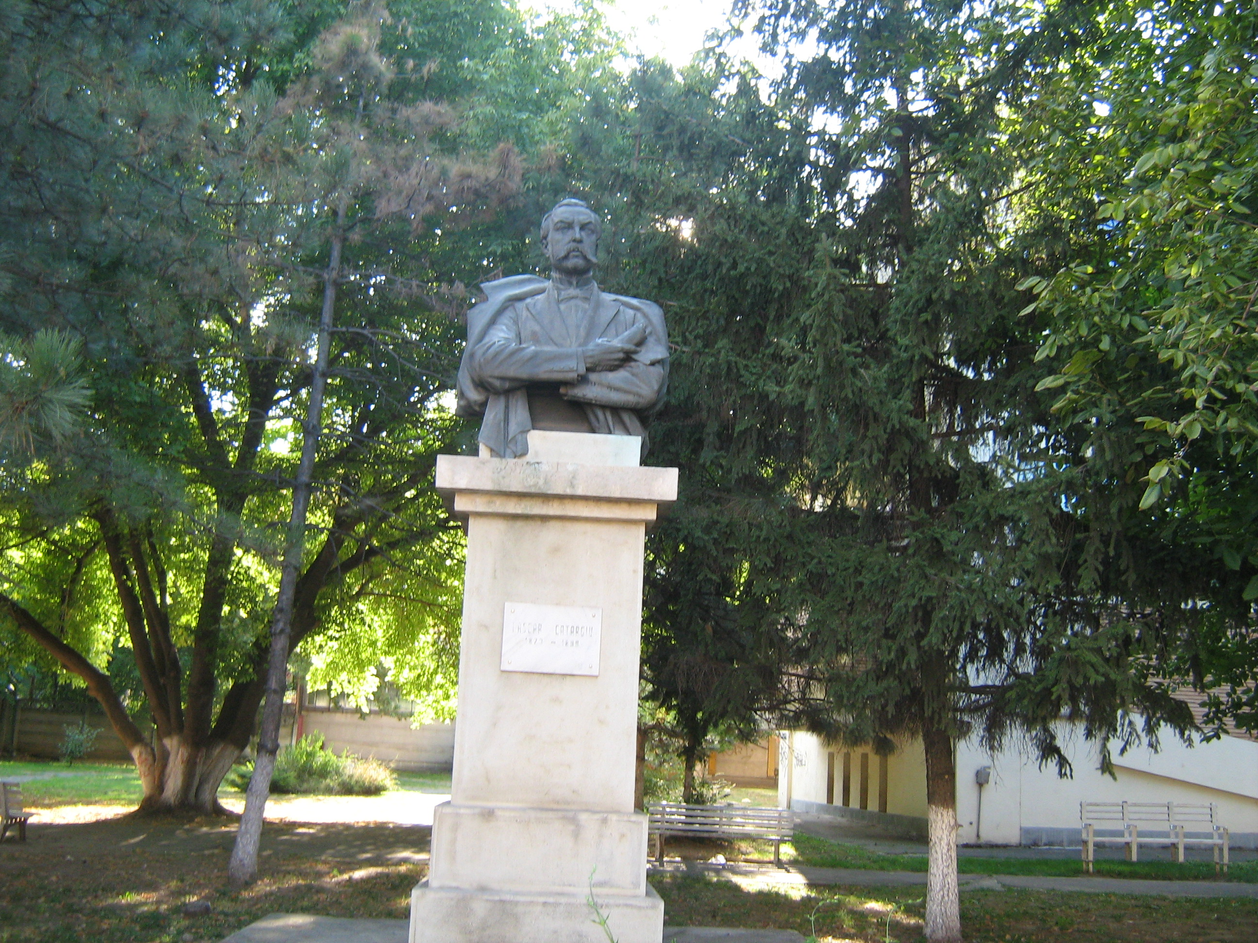 Galati - Bust lui Lascar Catargiu